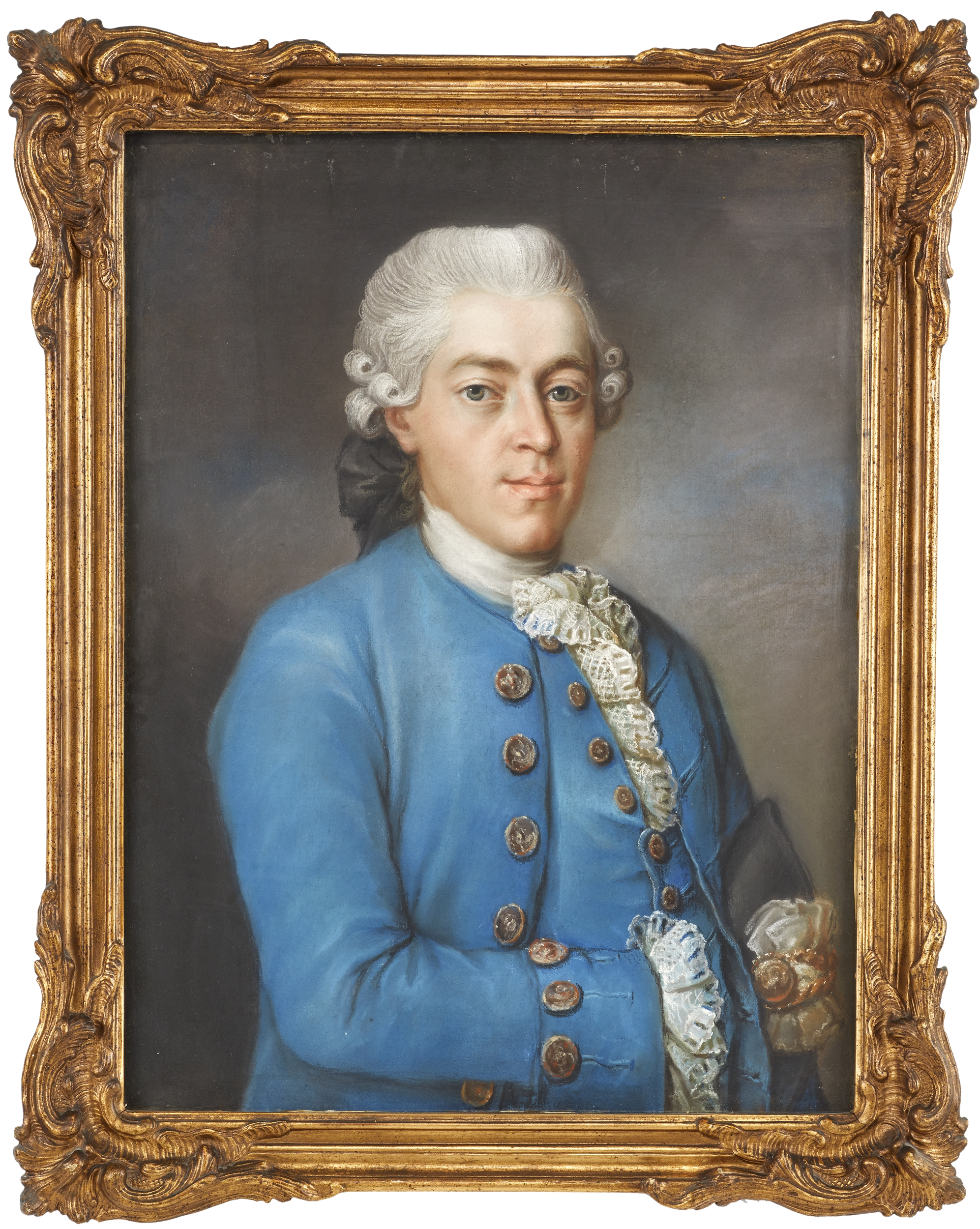 Porträtt av grosshandlaren Anders Petter Holm 1747-1786, iklädd blårock. Avporträtterad i pastell år 1775 av Gustaf Lundberg.